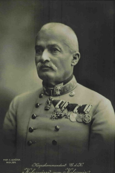 Dezső Kolossváry (Desiderius Kolossváry von Kolosvár; (1855-1919), Austrian-Hungarian general